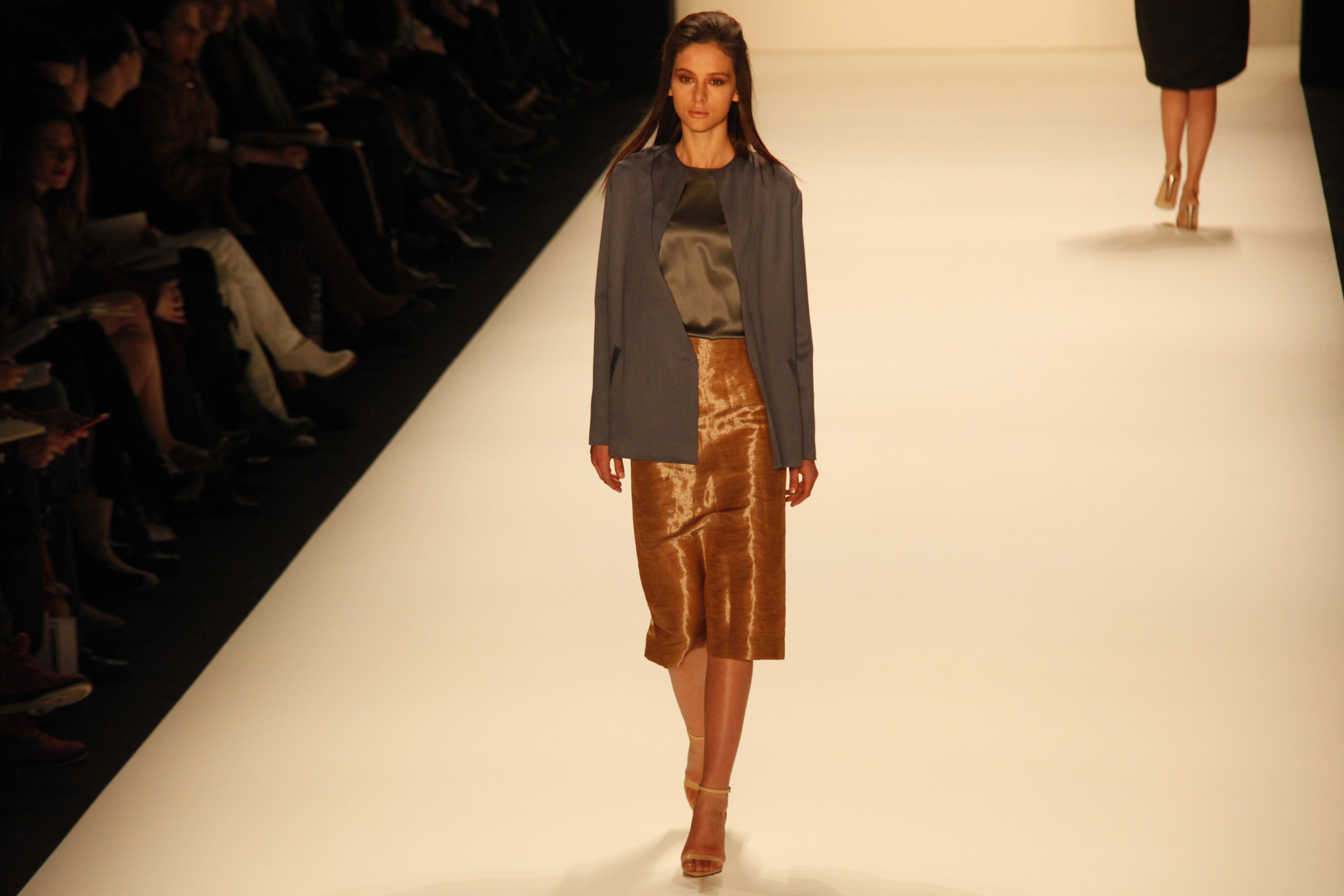 Berlin Fashion Week, Perret Schaad, 2013